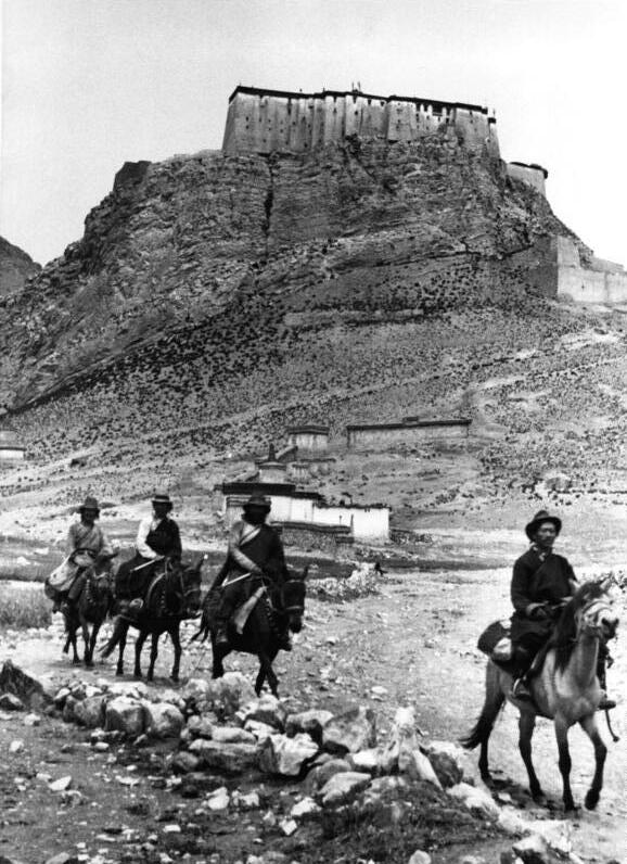 Kampadzong, die Burg